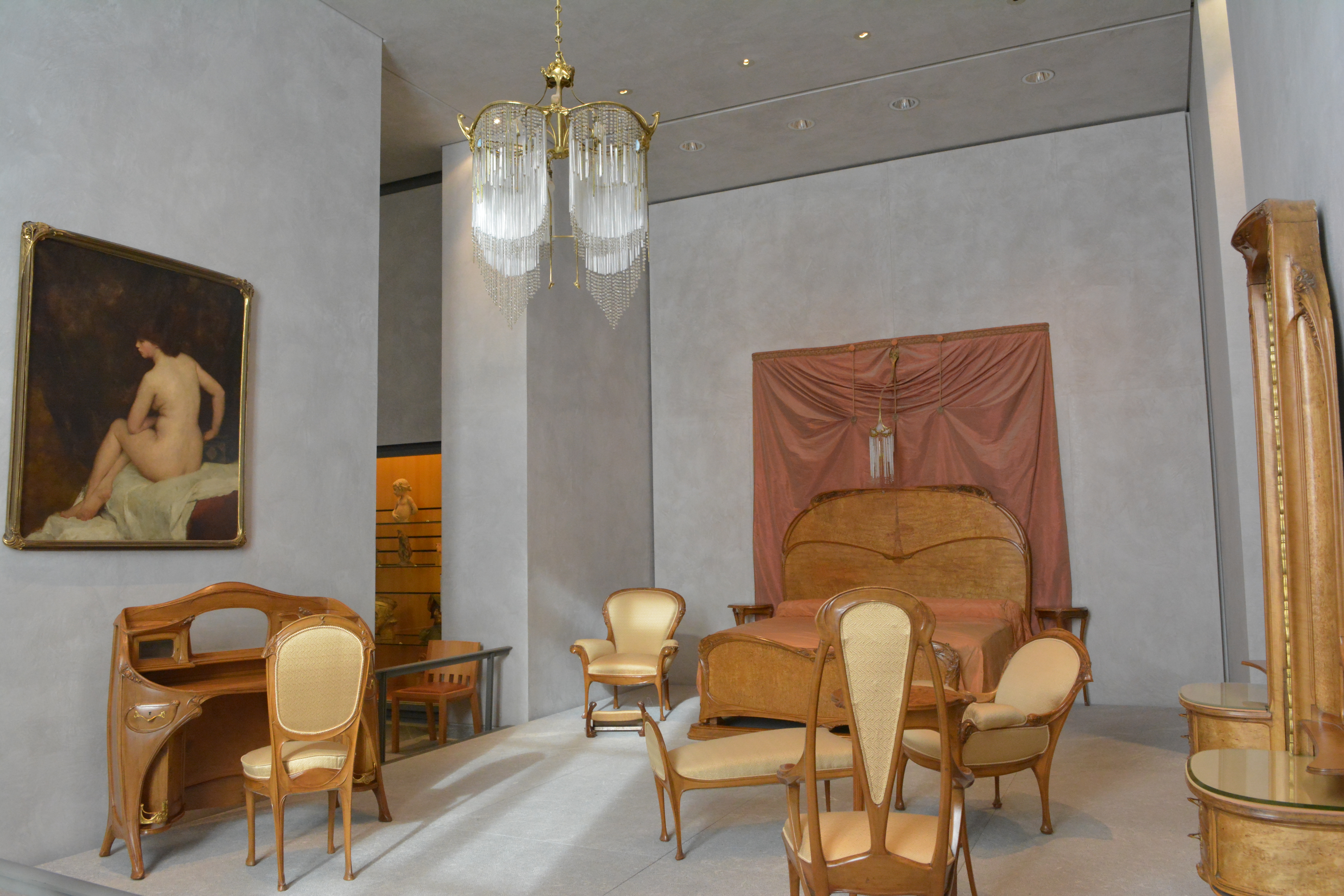 Mobilier provenant de la Chambre à coucher de l'Hôtel Guimard, reconstitué au Musée des Beaux-Arts de Lyon